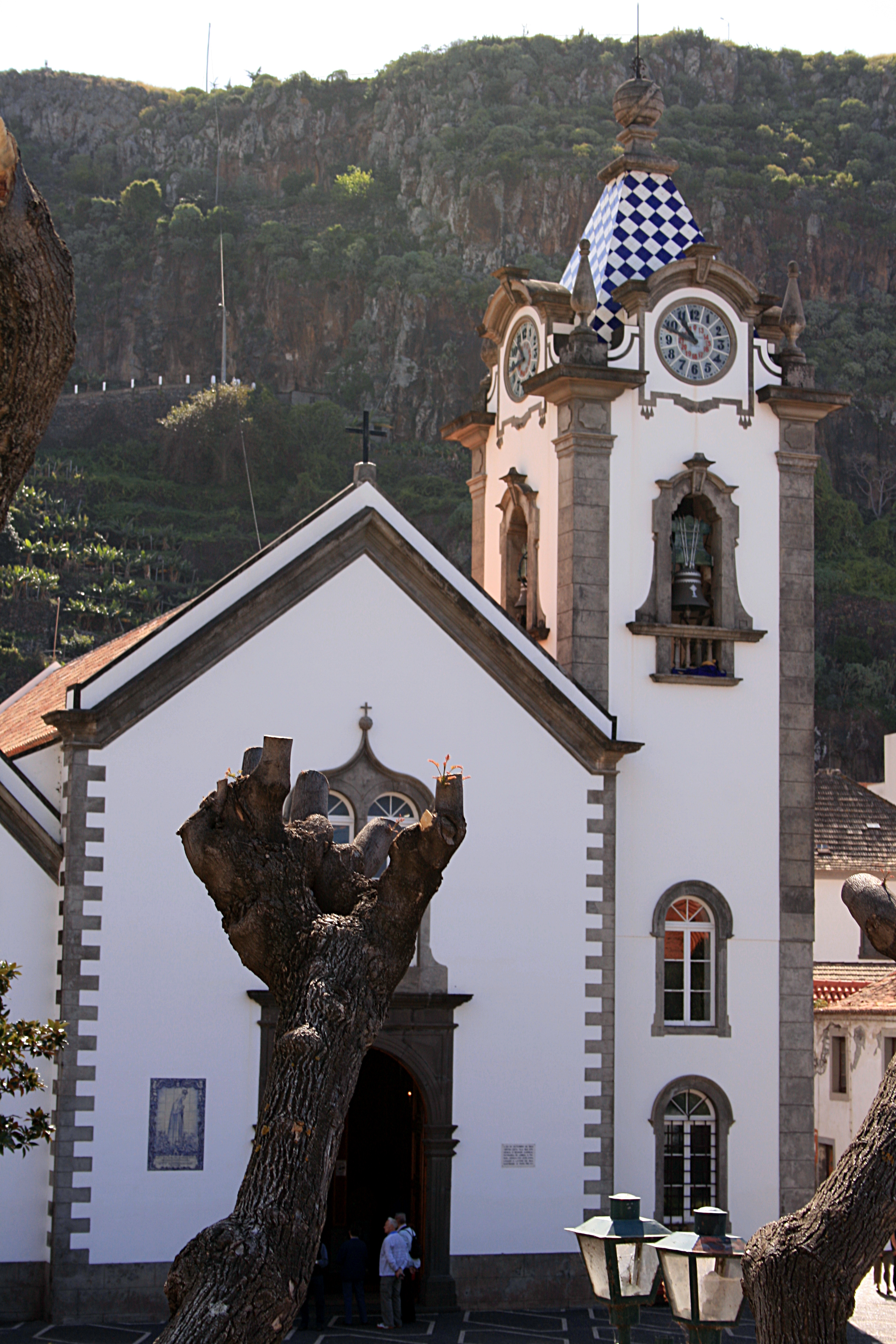 Madeira - Ribeira_Brava_-_Church São Bento